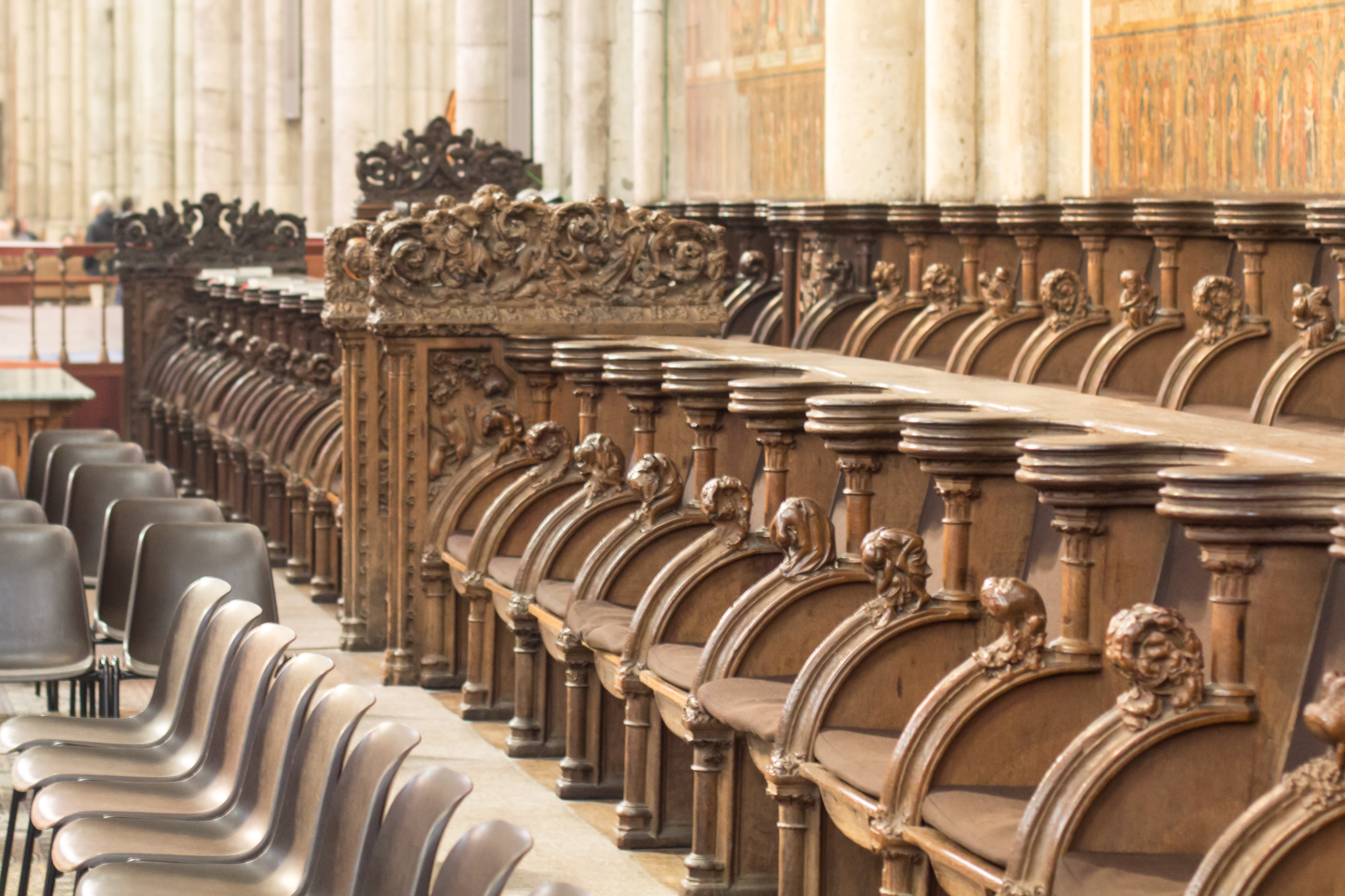 Teile des Chorgestühls des Kölner Domes. Nördliche Sitzreihe von Osten. Sichtbar Wange NC, vorne Reihe NII Sitze 13-5 (v.l.n.r)